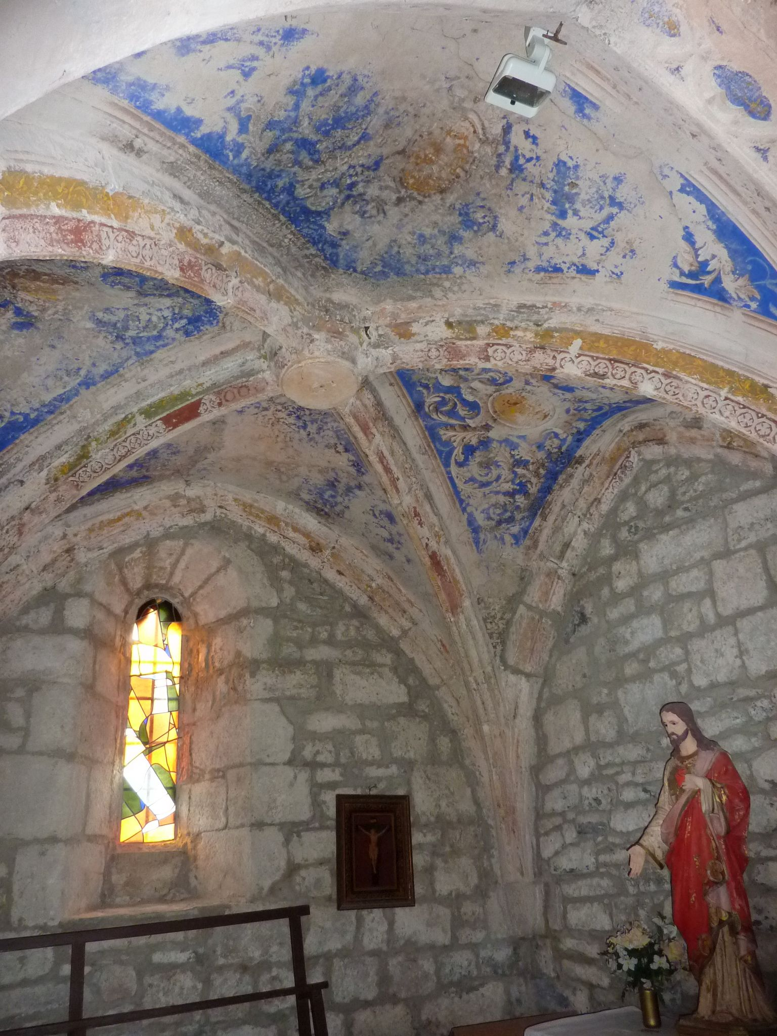 Église Sainte-Catherine de Penne